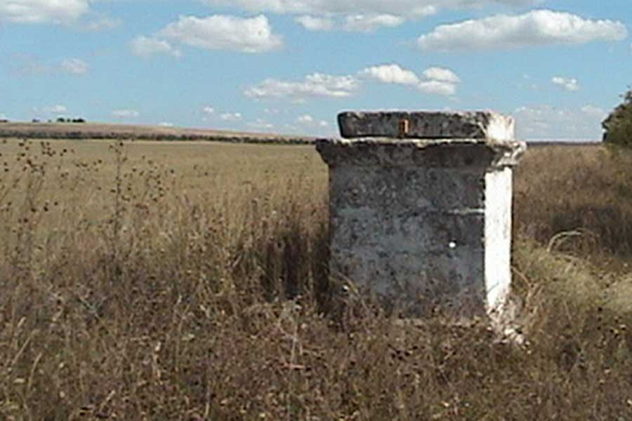 Екатерининская миля возле села Цветочное не сохранилась. От нее остался один постамент.